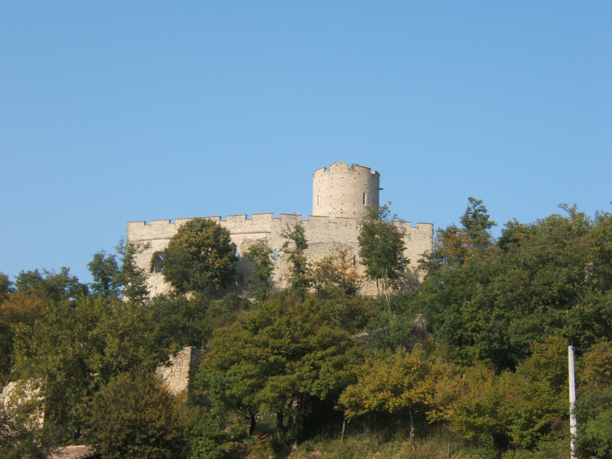 Château de Fallavier (France), côté Sud